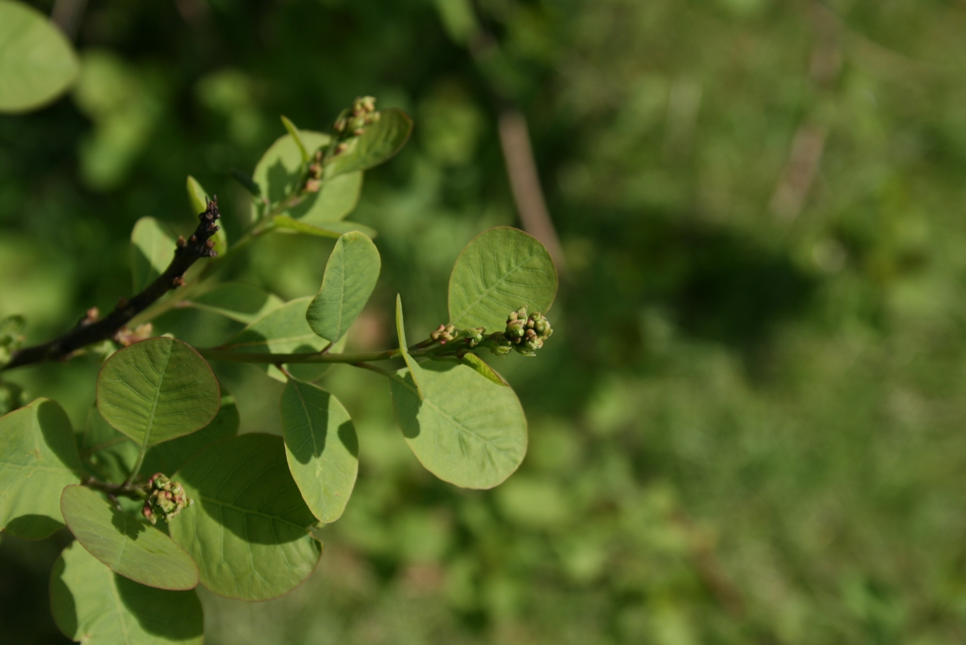 Cotinus obovatus: Foliage